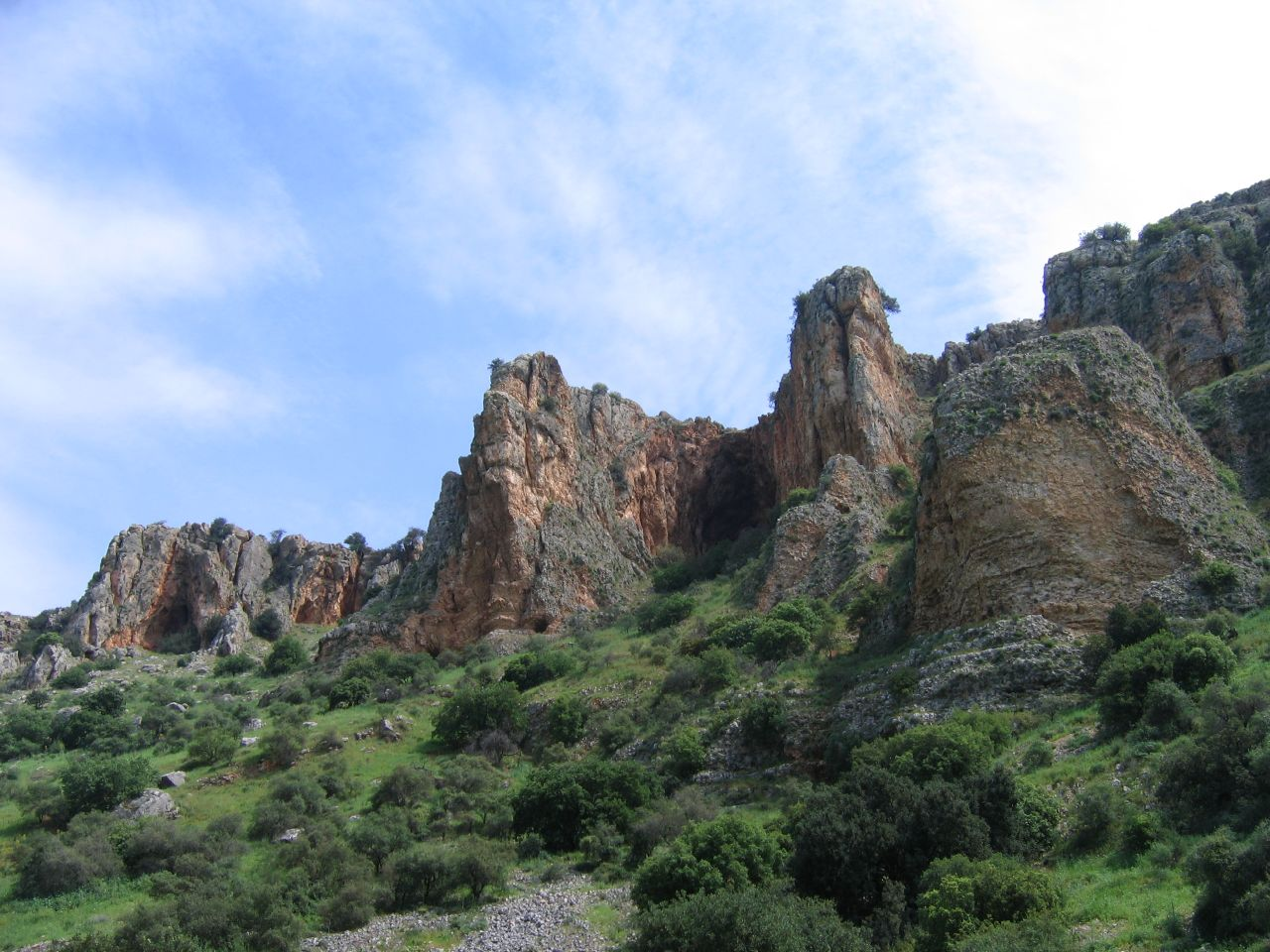 Nahal Amud Cliffs Nahal Amud